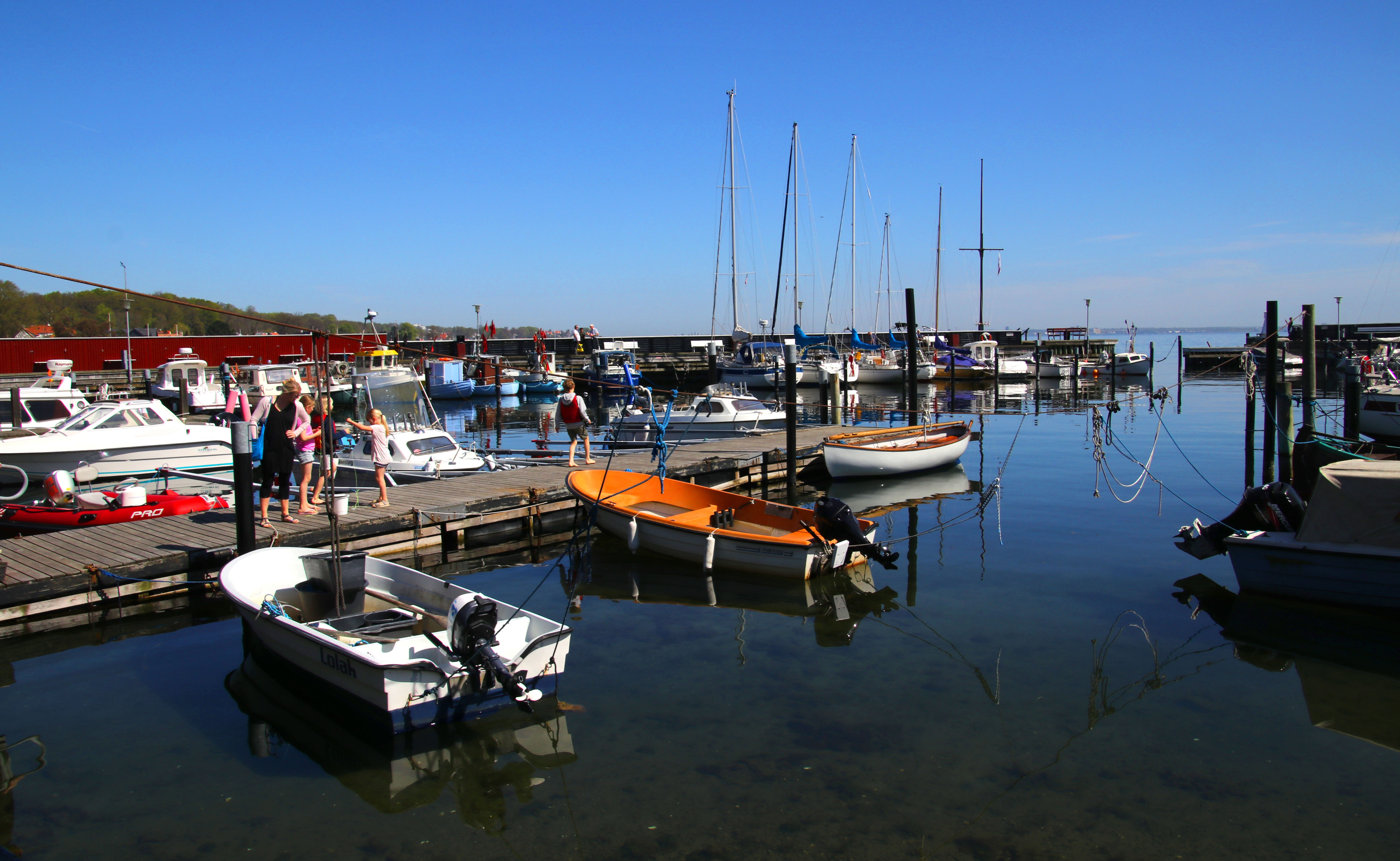 Espergærde. I havnen.